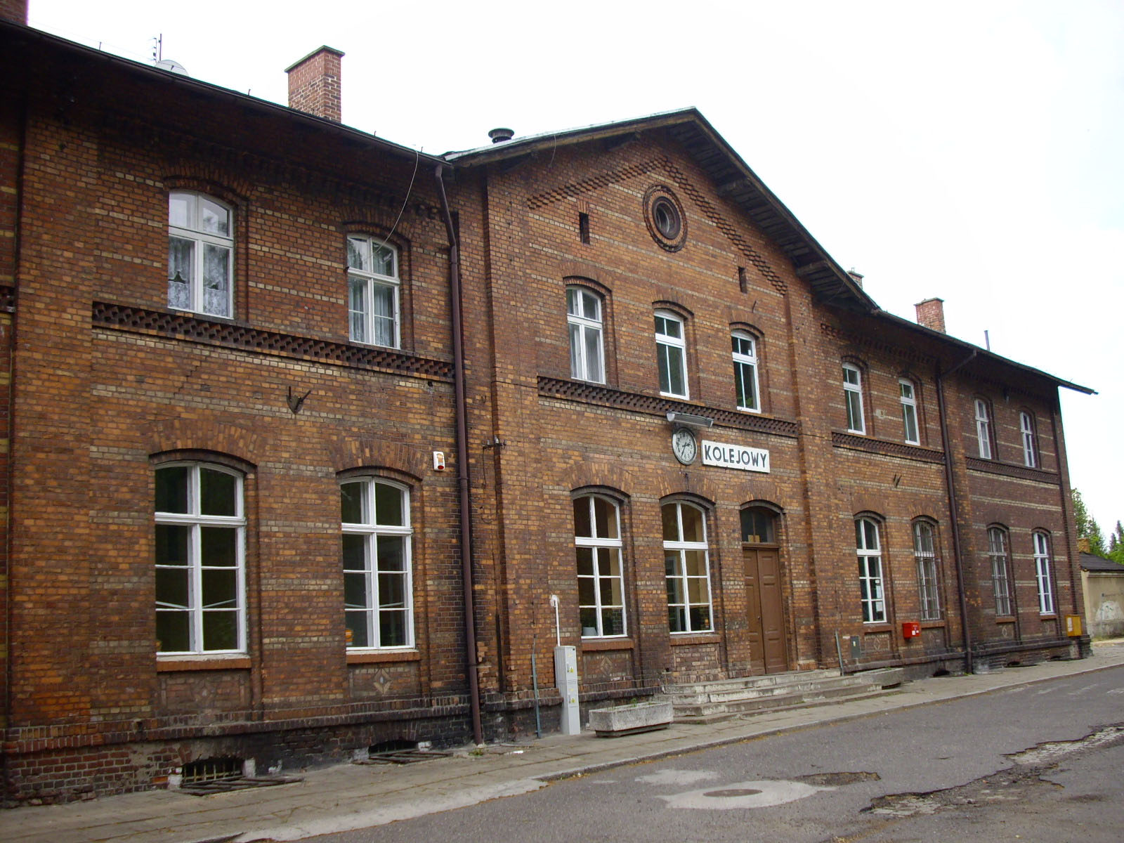 Budynek dworca PKP w Sulechowie.